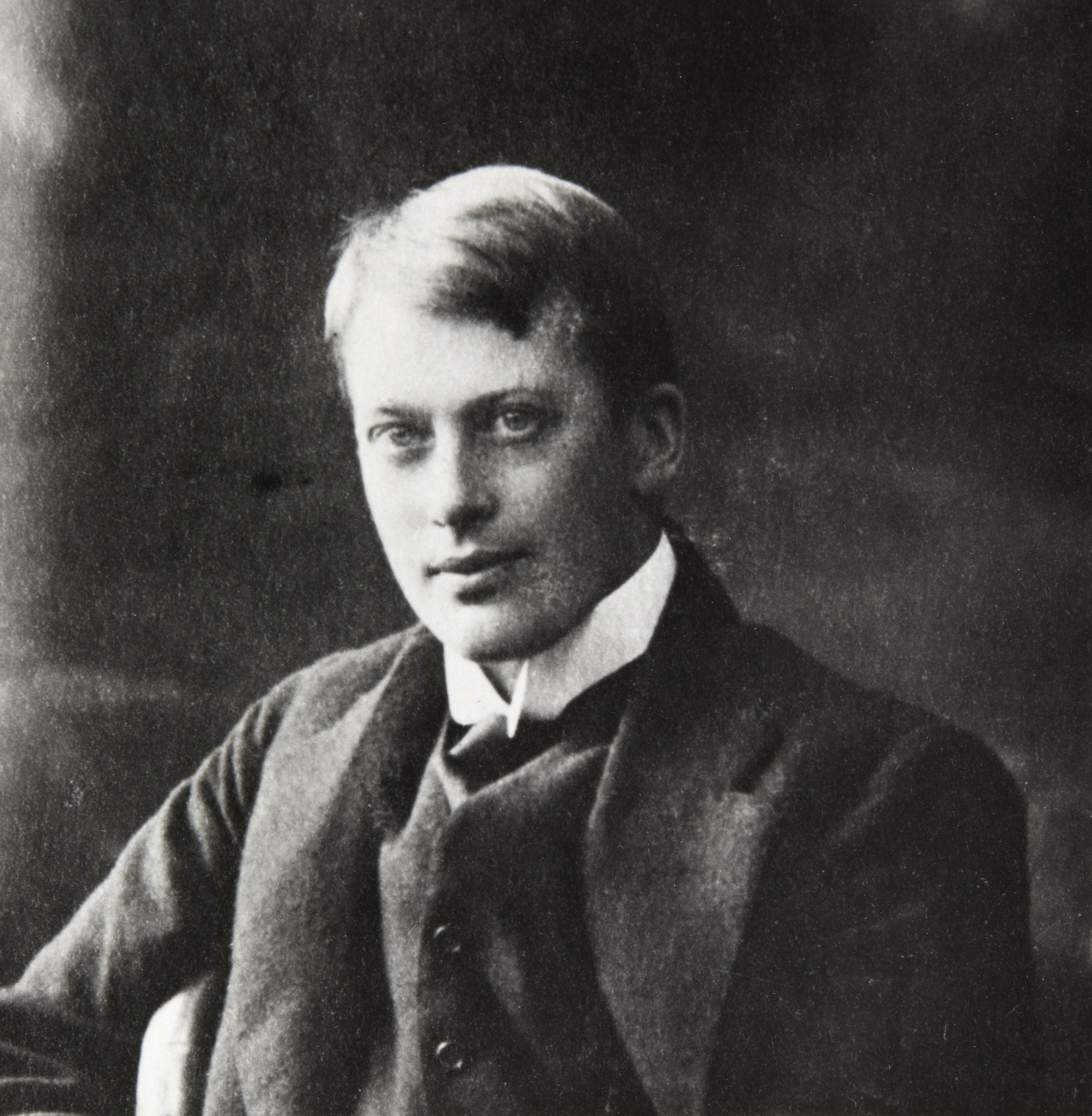 W. G. Palmqvist